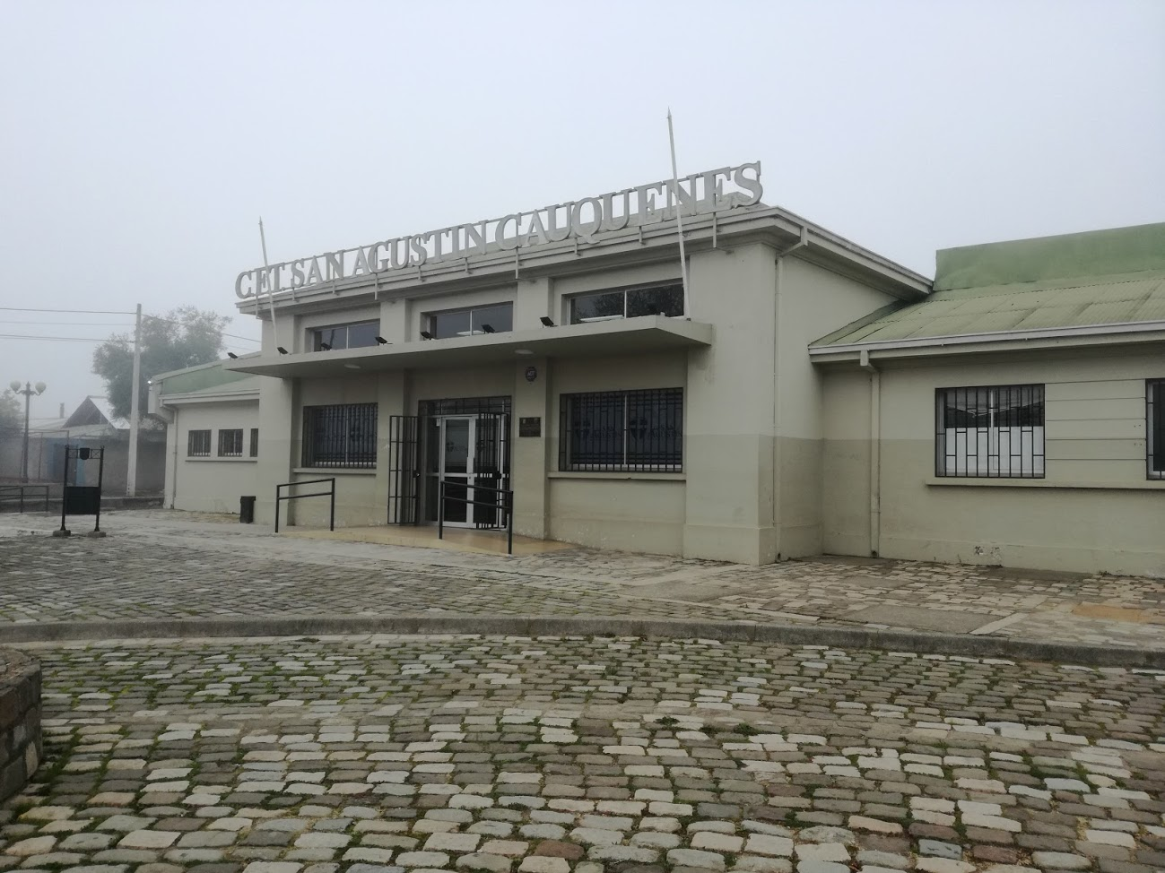 Antigua estación ferroviaria de Cauquenes. Hoy es la sede del CFT San Agustín en esa ciudad